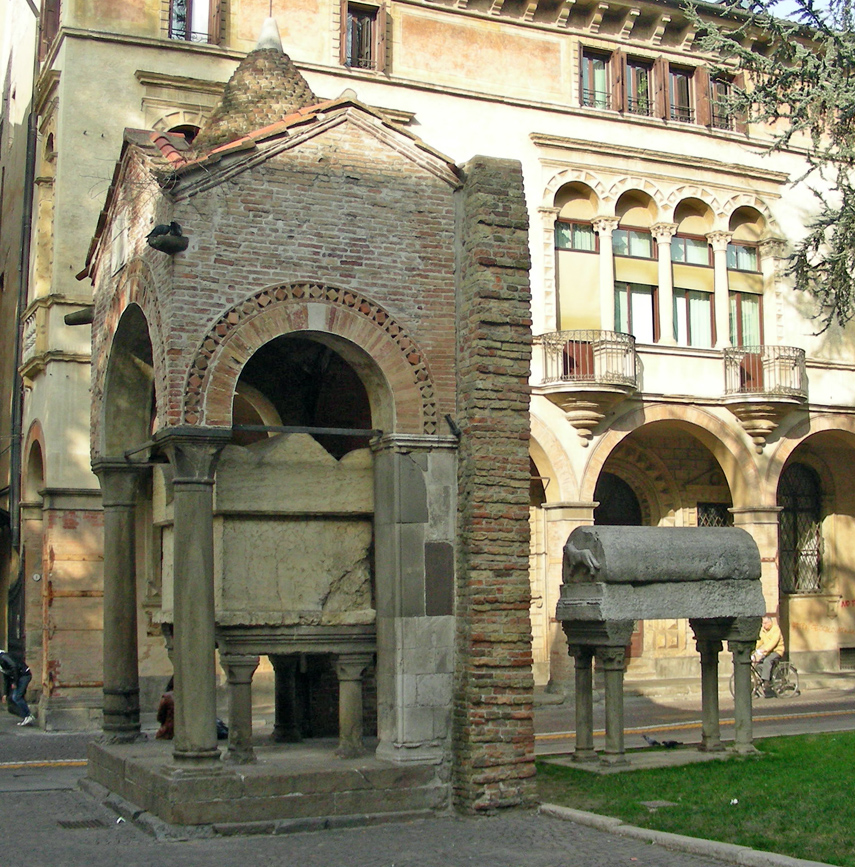 Padova, cosiddetta tomba di Antenore